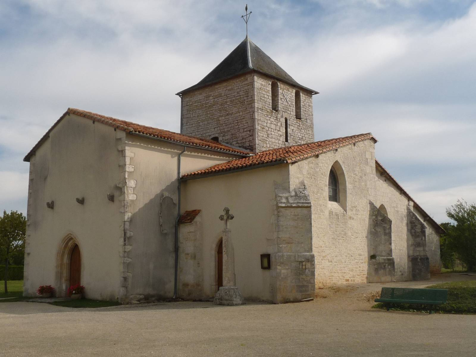 église de Chenommet, Charente, France